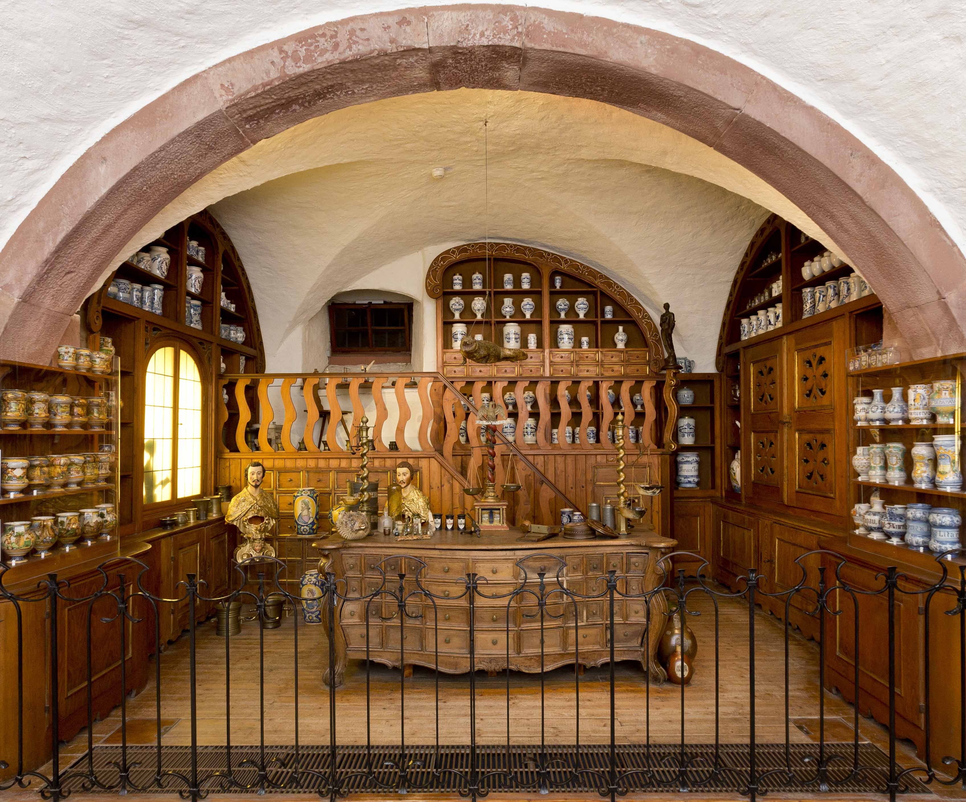 Offizin aus Bamberg (1. Hälfte 18 Jh.)